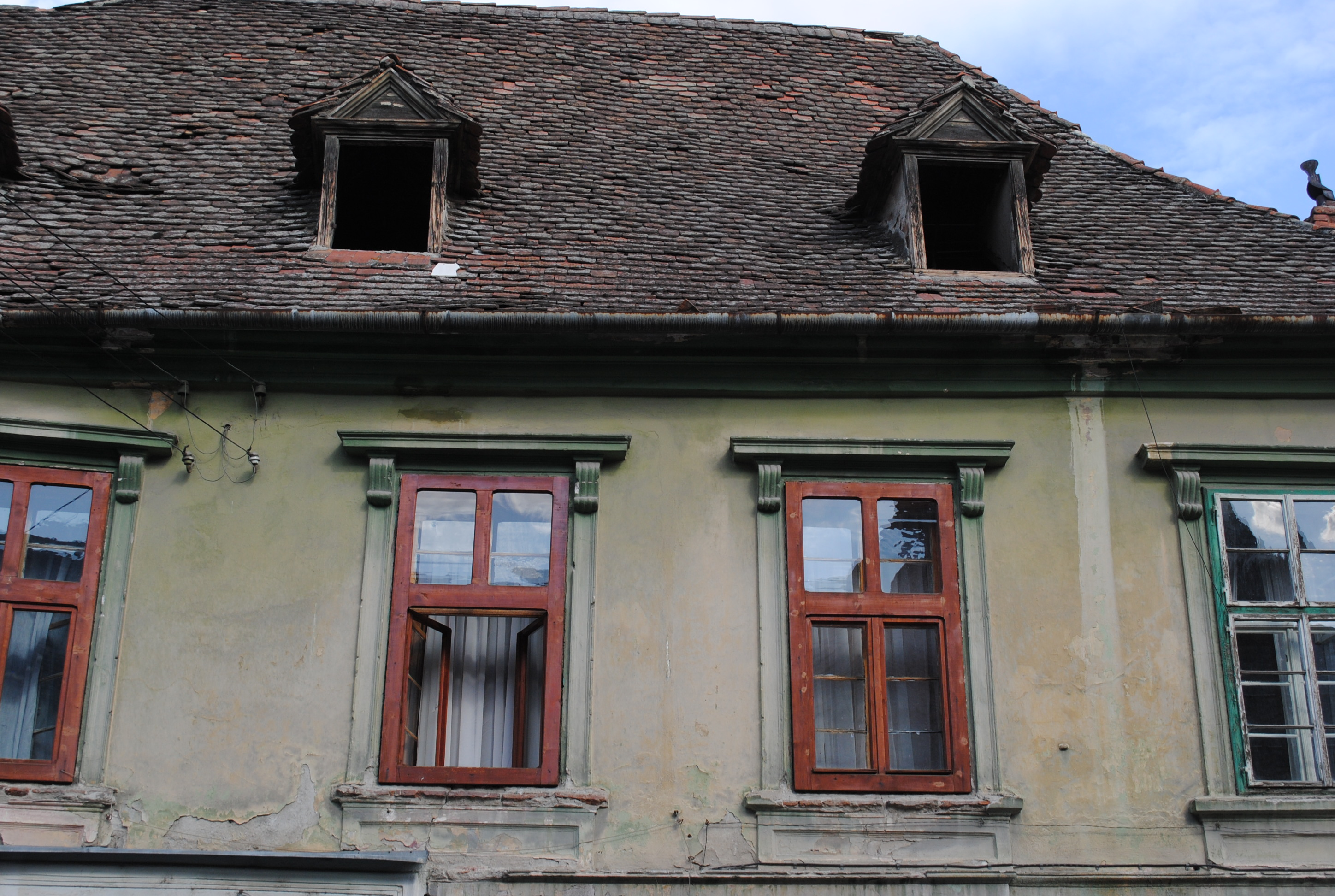 Casă, a doua jum. sec. XIV - prima jum. sec. XVI; ultimul sfert al sec. XVIII-primul sfert al sec. XIX